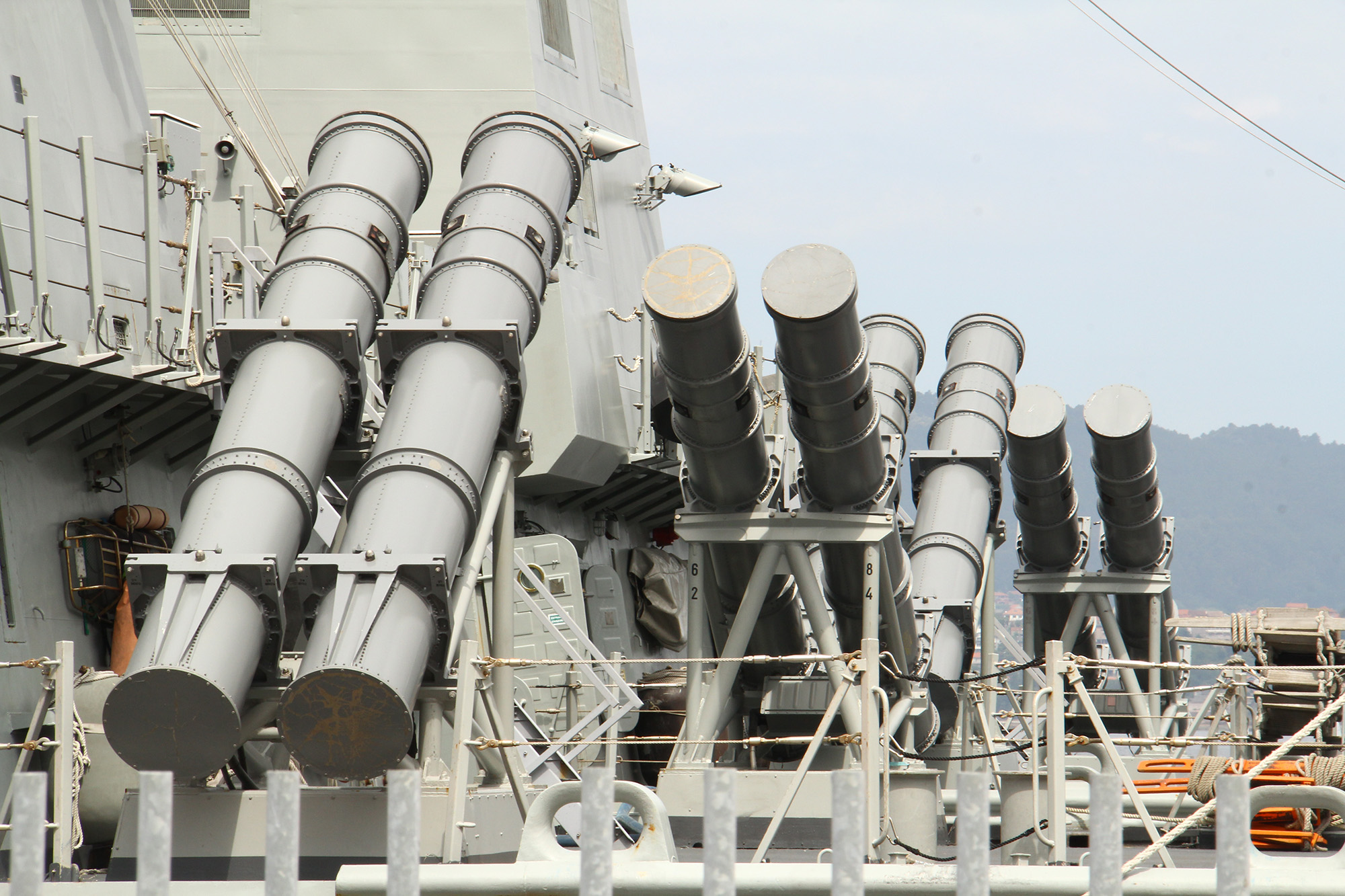 Visita a Vigo de las fragatas "Álvaro de Bazán" F-101 y "Almirante Juan de Borbón" F-102 de la Armada Española, ambas de la clase "Álvaro de Bazán" (también conocida como F-100), el 27 y 28 de mayo de 2017. Frigates F-100 in Vigo Visit to Vigo of the frigates "Álvaro de Bazán" F-101 and "Admirante Juan de Borbón" F-102 of the Spanish Navy, both of the class "Álvaro de Bazán" (also known as F-100), May 27 and 28, 2017.